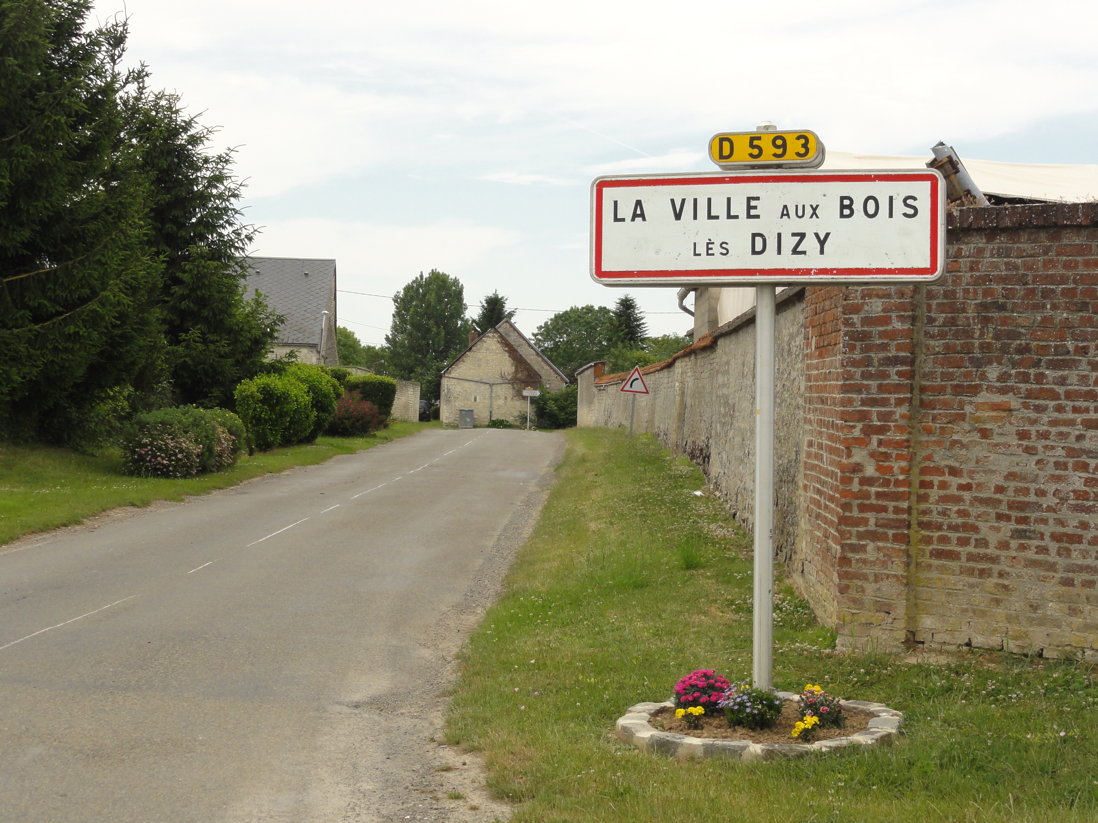 La Ville-aux-Bois-lès-Dizy (Aisne) city limit sign